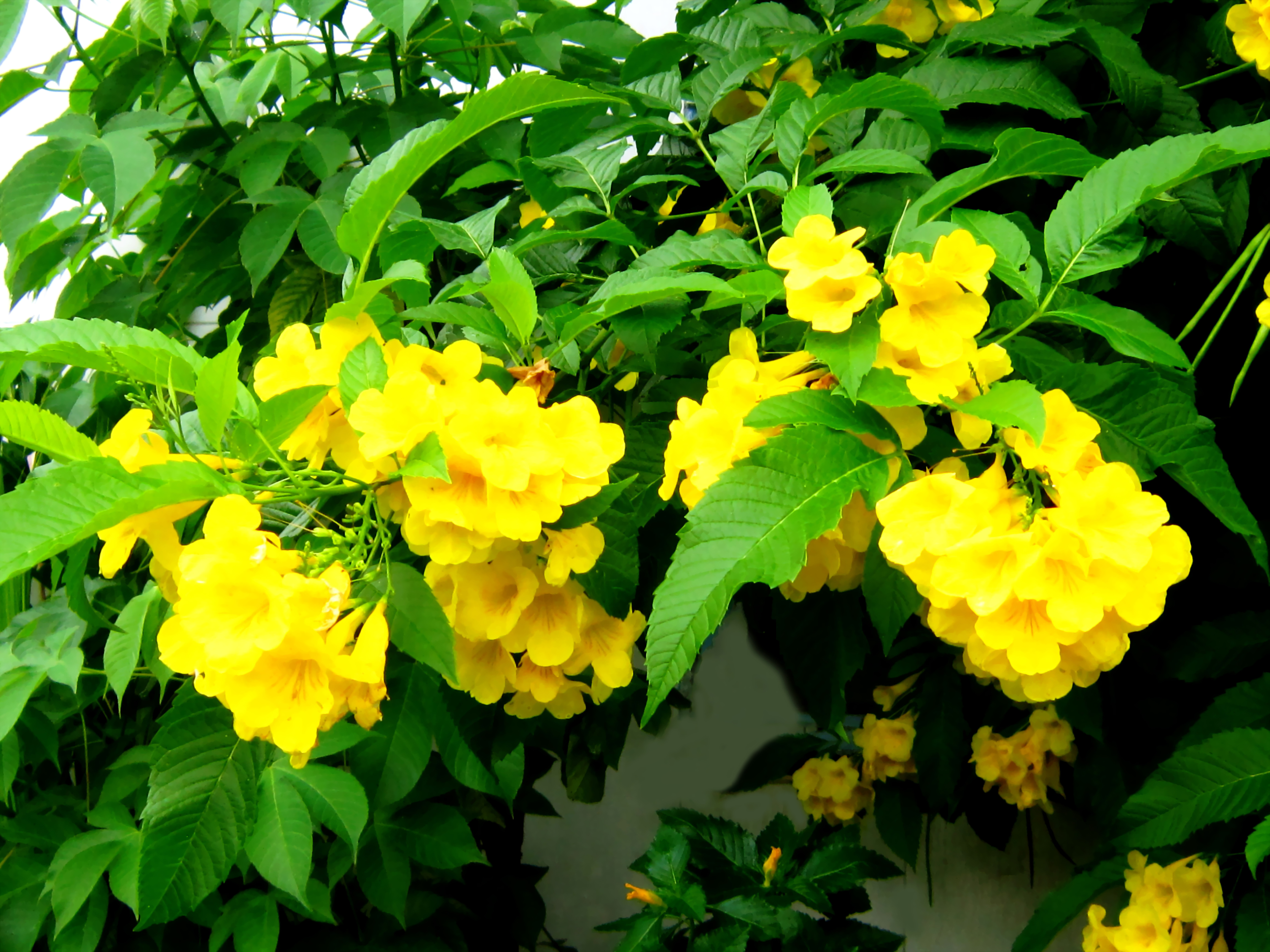 Hoa và lá cây chuông vàng. Cây thuộc họ Bignoniaceae.